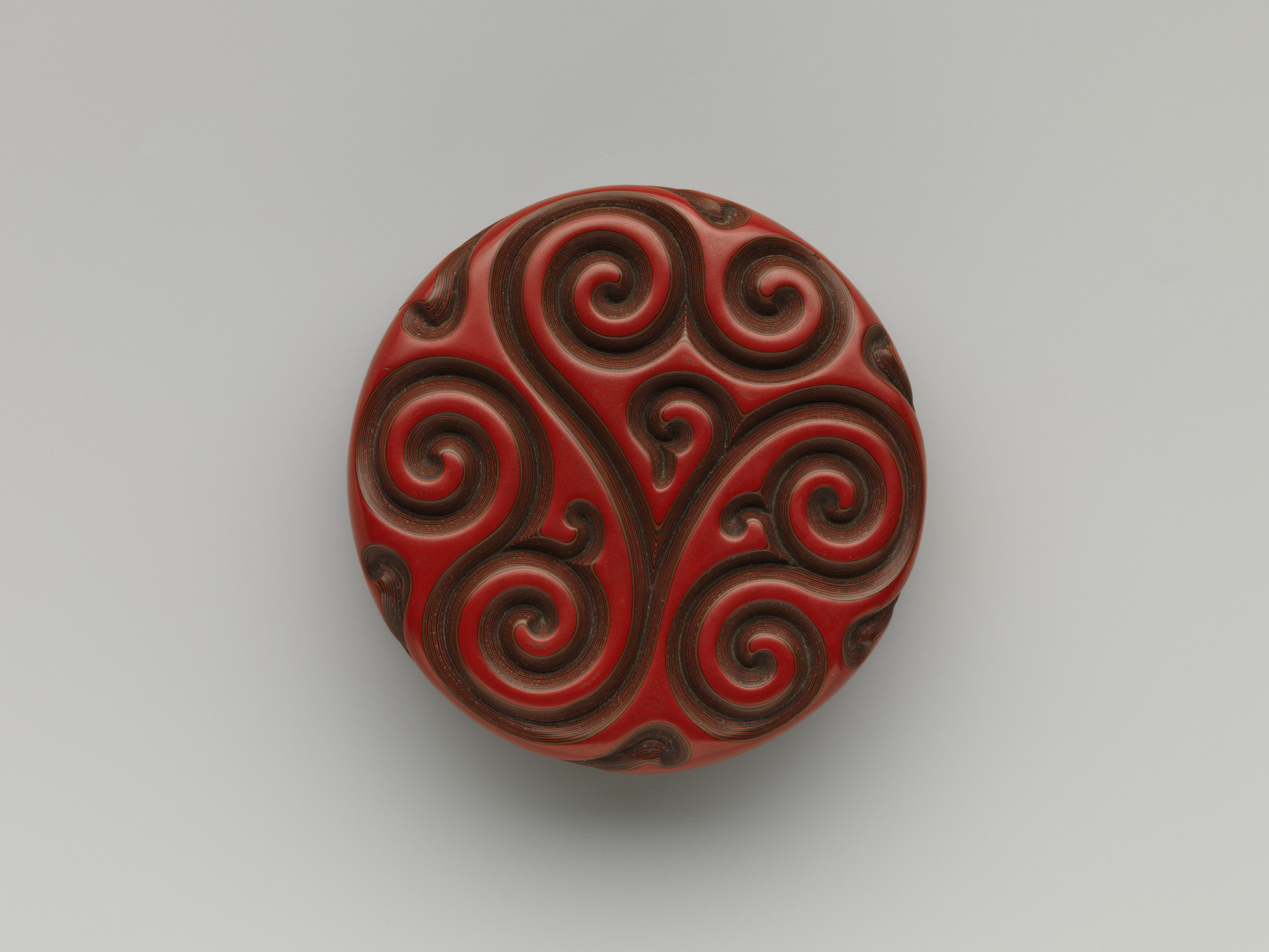 China; Incense box; Lacquer